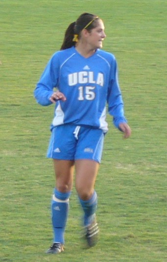 Kara Lang of UCLA at Santa Clara